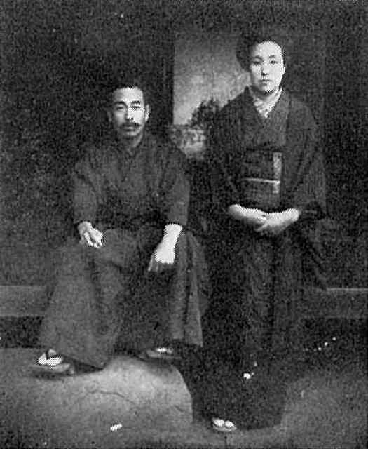 針塚長太郎 大正9年晩秋